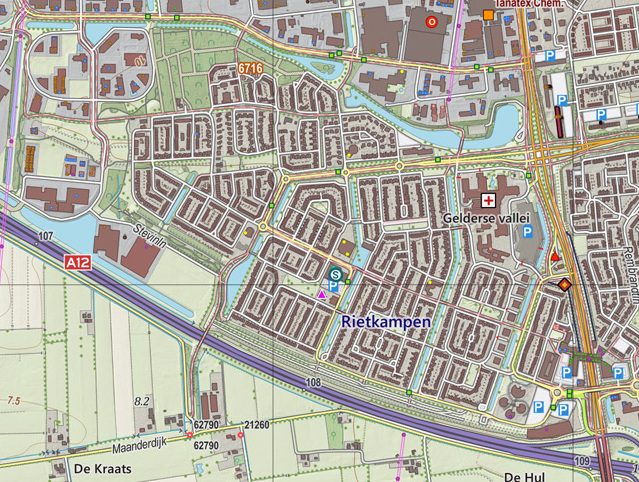 Topografische kaart van Ede (woonplaats). Resolutie: 300 pixels/km. Kaartbeeld samengesteld uit de open geodata van de Top10NL en Top25namen (Basisregistratie Topografie, Kadaster), Creative Commons BY licentie. Gebouwvlakken uit open geodata BAG extract. Wegen uit de OpenStreetMap, OpenStreetMap community. Reliëfschaduw uit de Actuele Hoogtekaart AHN2. Samenstelling en kleurenschema: Jan-Willem van Aalst, met QGIS2. Zie ook de Legenda.